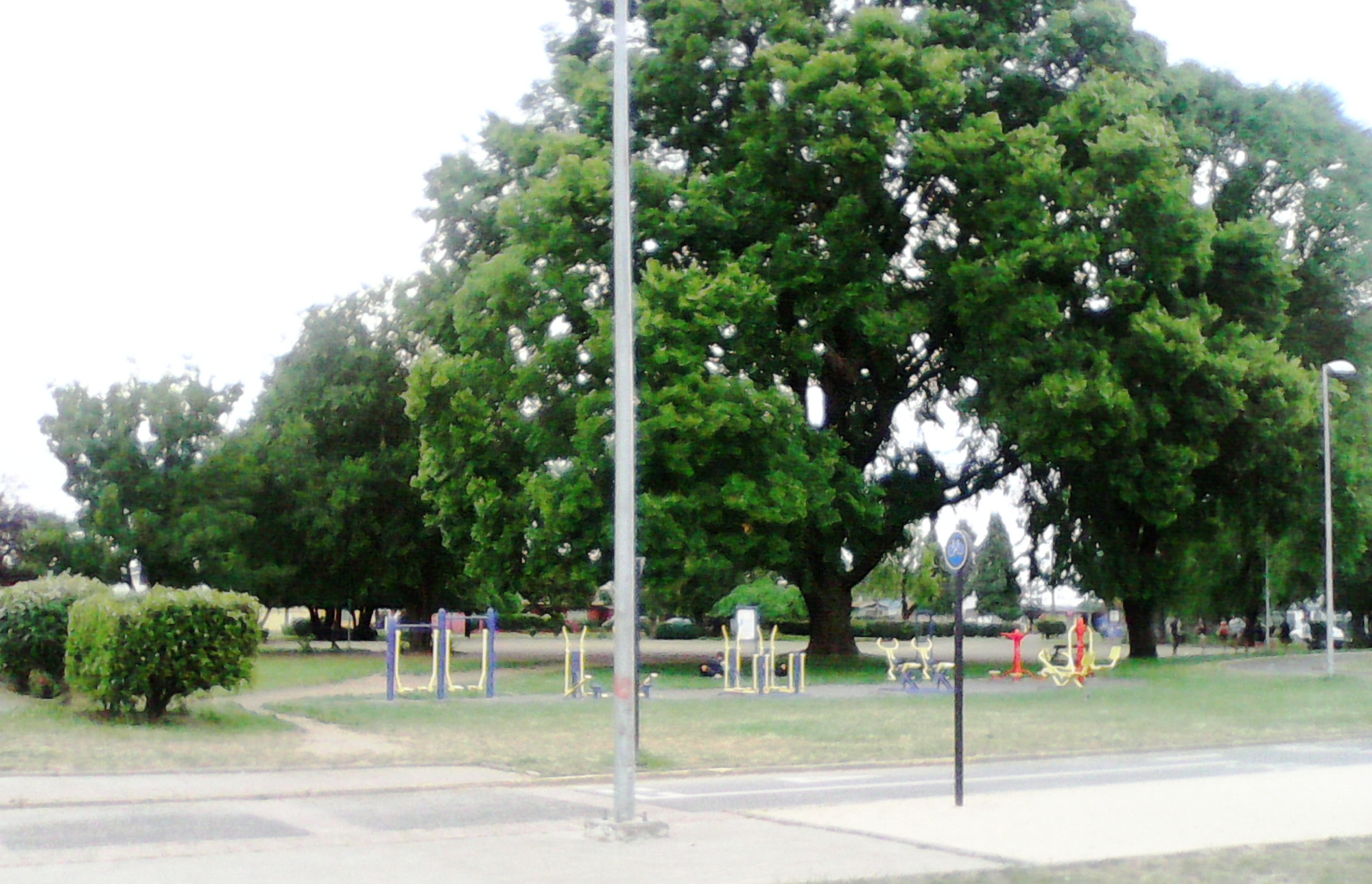 Plaza Alonso de Ercilla de Temuco, Chile, vista desde la esquina de la calle Prieto Sur con la Ciclovía Temuco-Labranza.